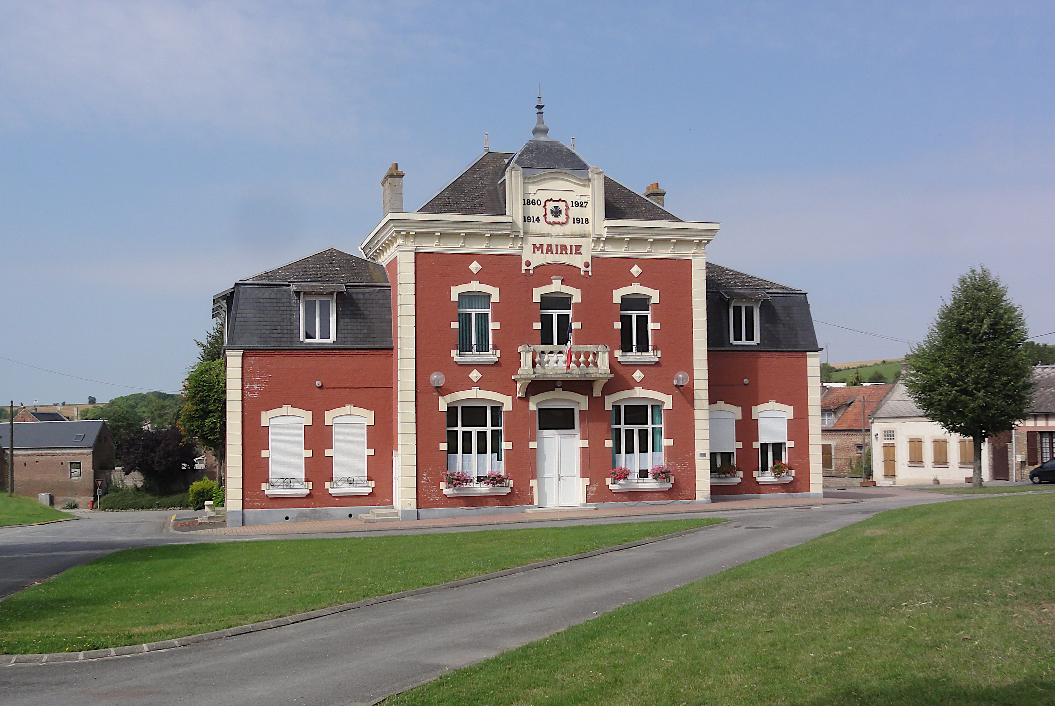 Bernot (Aisne) mairie